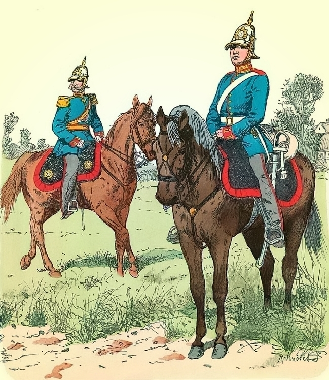 Mecklenburger Dragoner im Jahr 1847